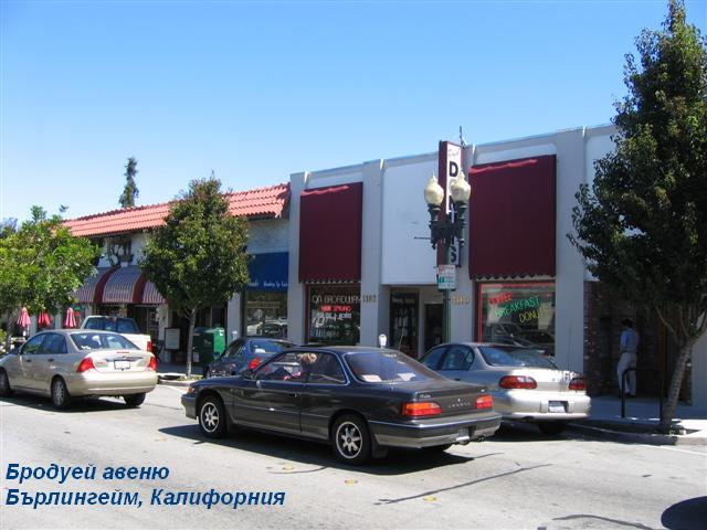 Бродуей авеню, друга основна търговска улица, Бърлингейм (авторска снимка)